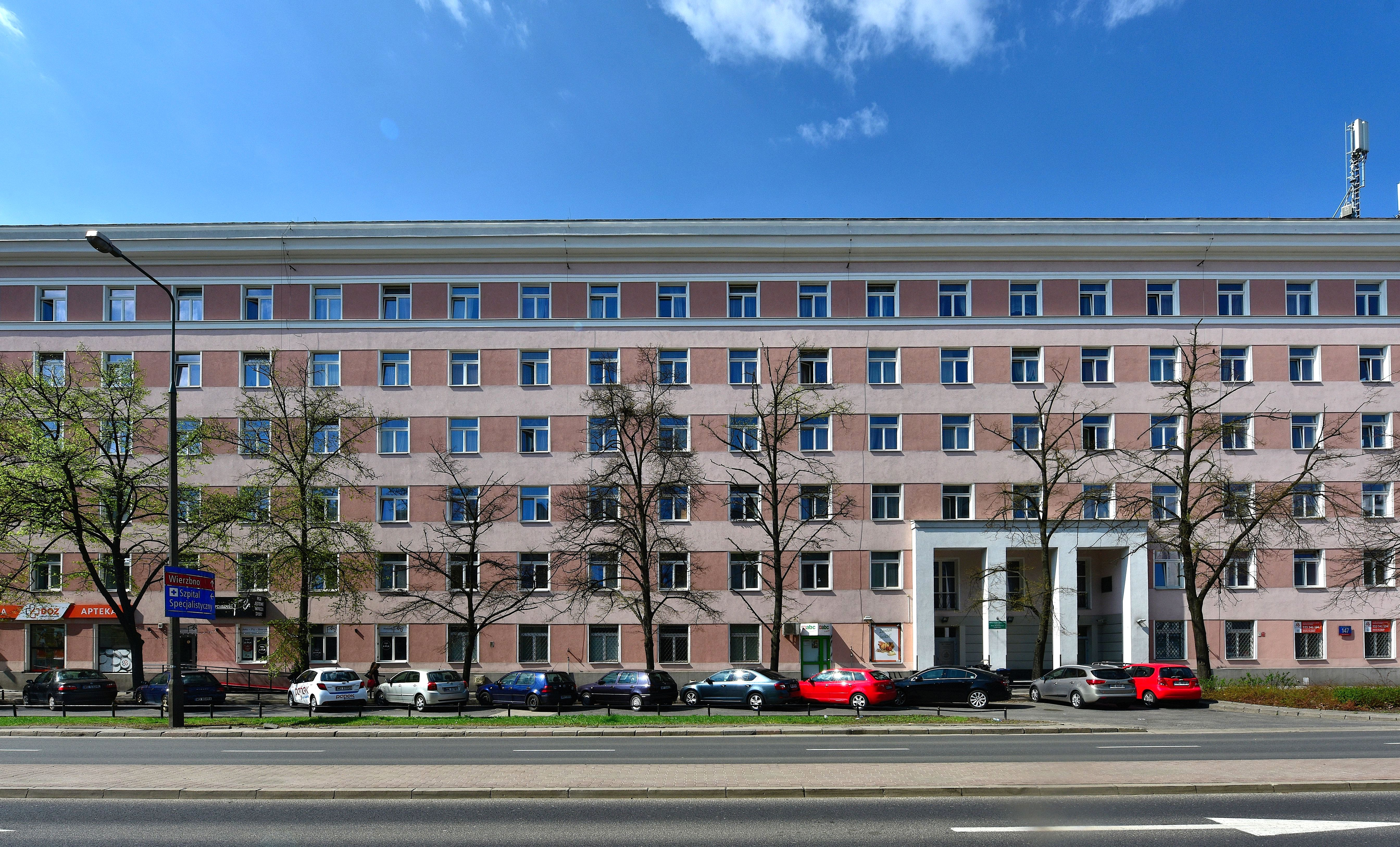 Dom Studencki SGH Sabinki przy al. Niepodległości 147 w Warszawie